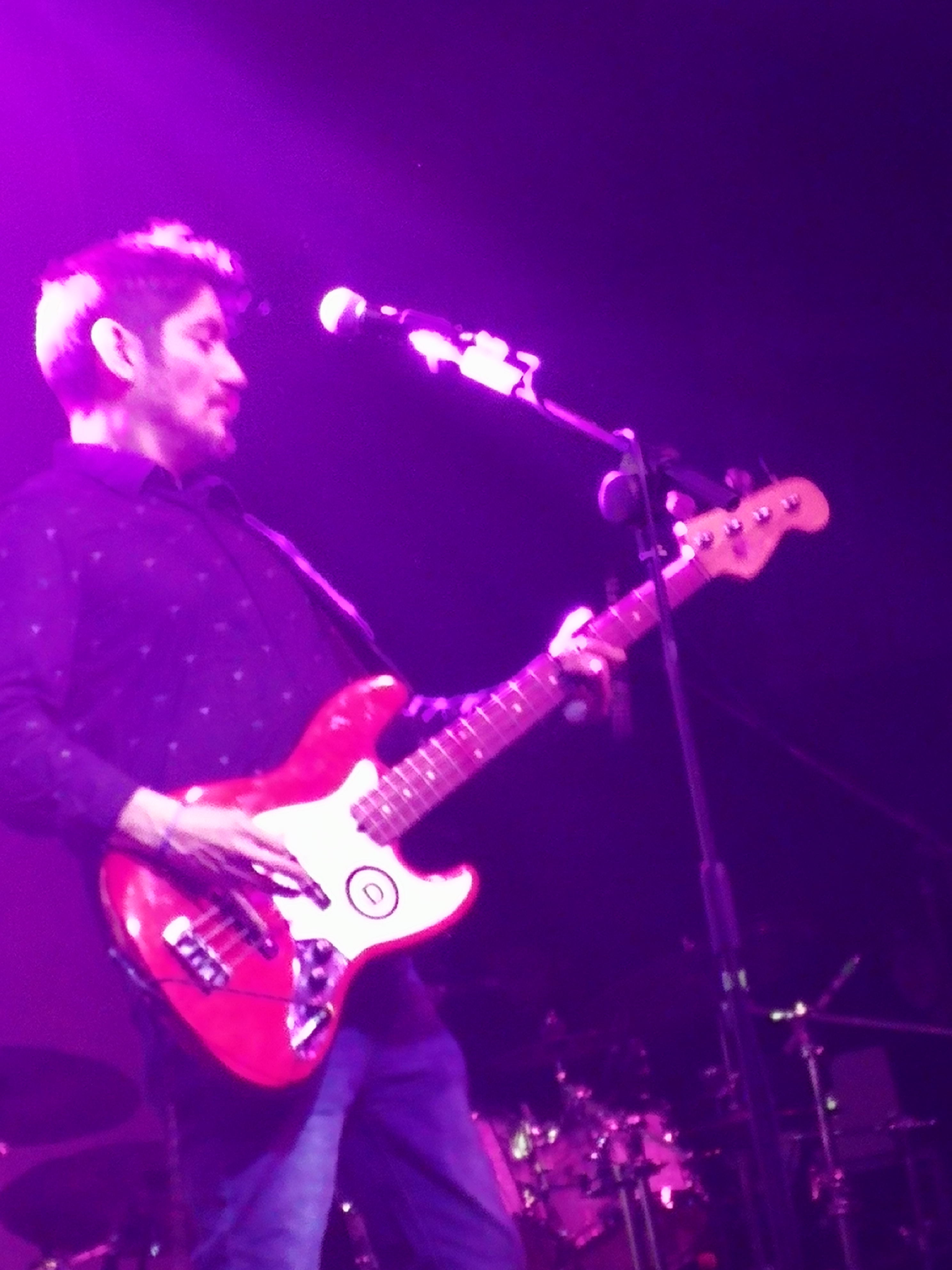 Saiko en el Club Amanda, Vitacura, Santiago de Chile - Agosto 2017, Lanzamiento álbum Lengua Muerta